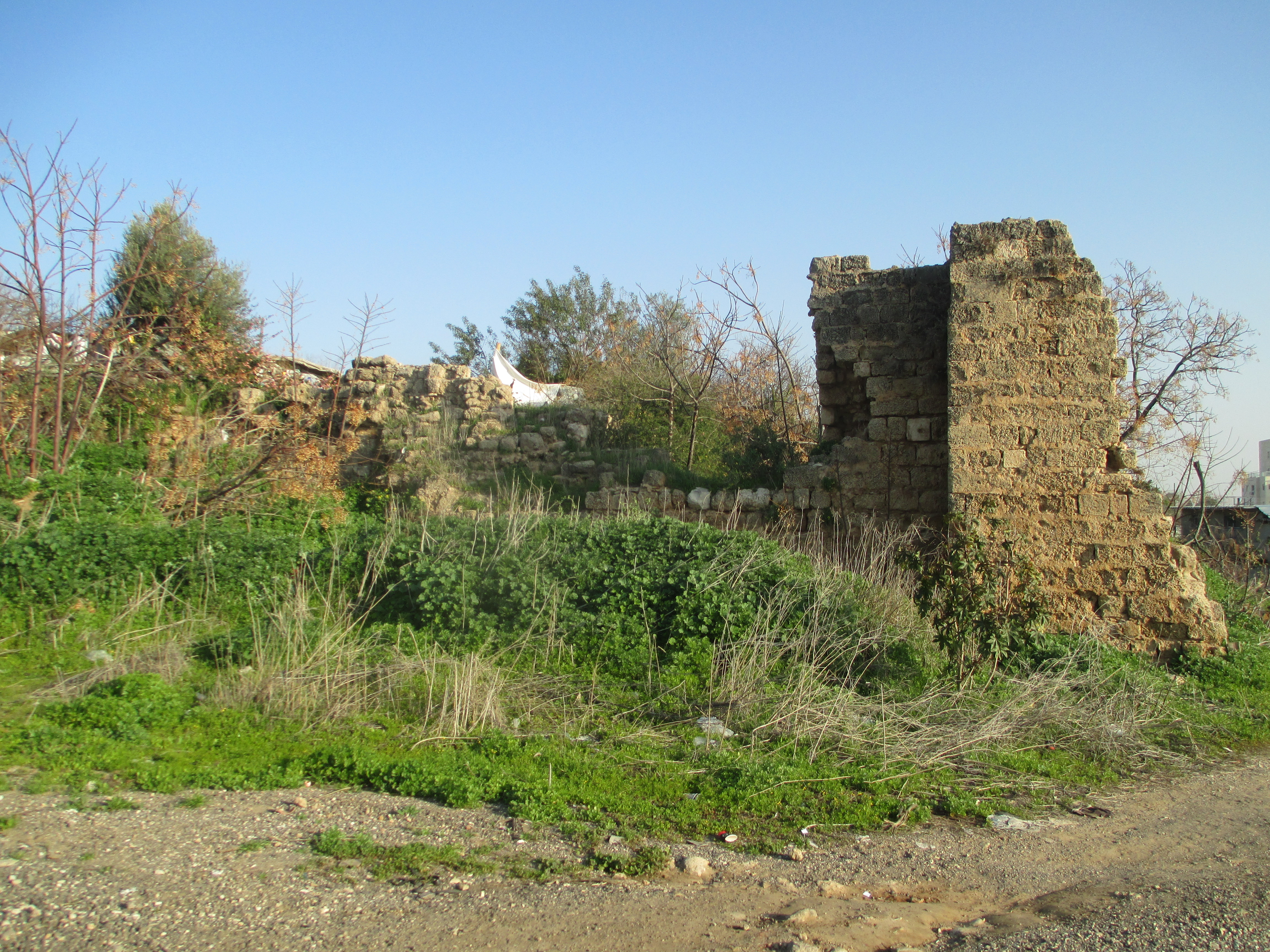 מצודת אום חאלד בנתניה